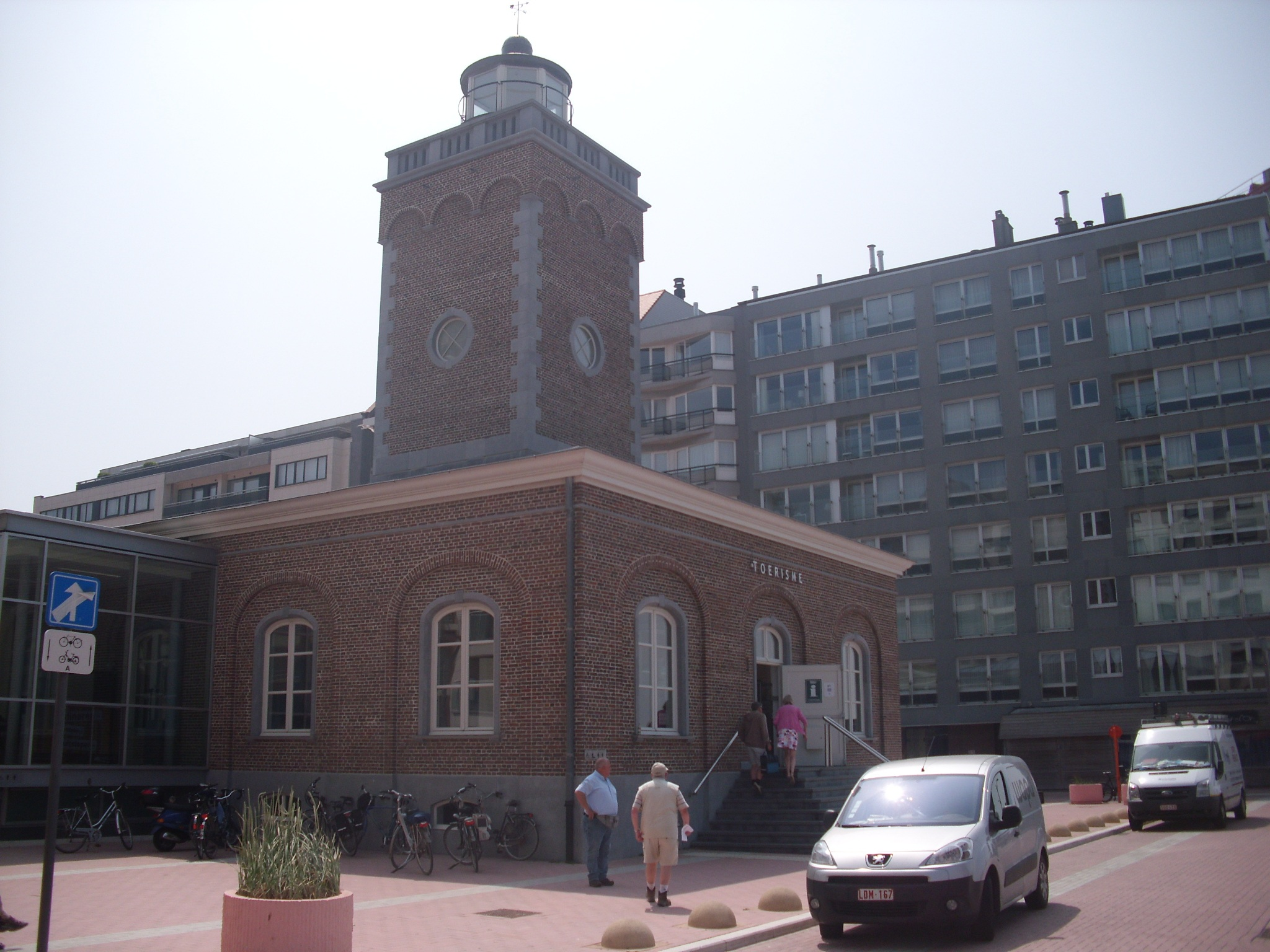 Dienst voor Toerisme - Lichttorenplein - Knokke - Knokke-Heist - West-Vlaanderen - België